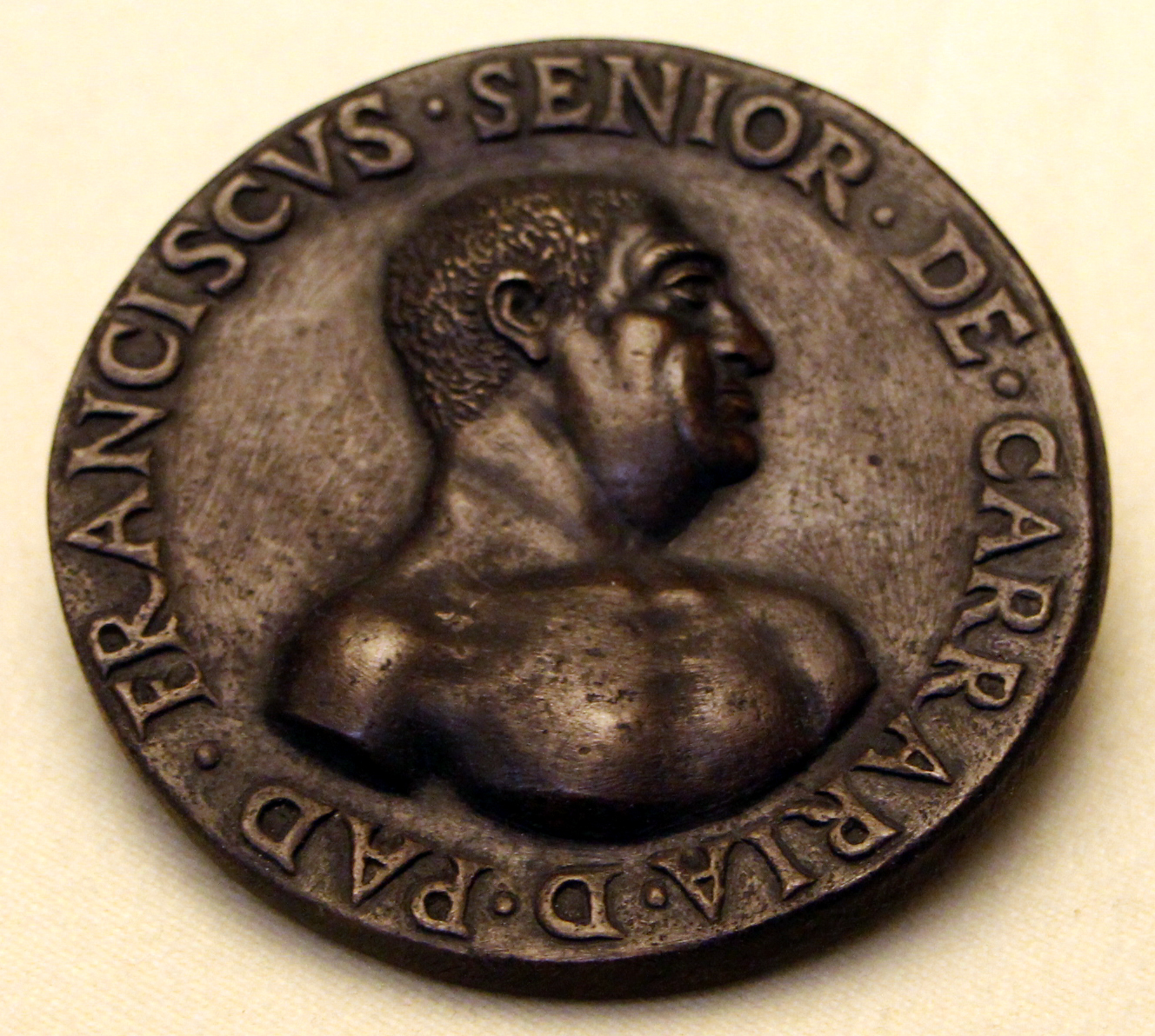 Galleria G. Franchetti alla Ca' d'Oro - MIBAC The making of this document was supported by Wikimedia CH. (Submit your project!) For all the files concerned, please see the category Supported by Wikimedia CH. This is a photo of a monument which is part of cultural heritage of Italy.